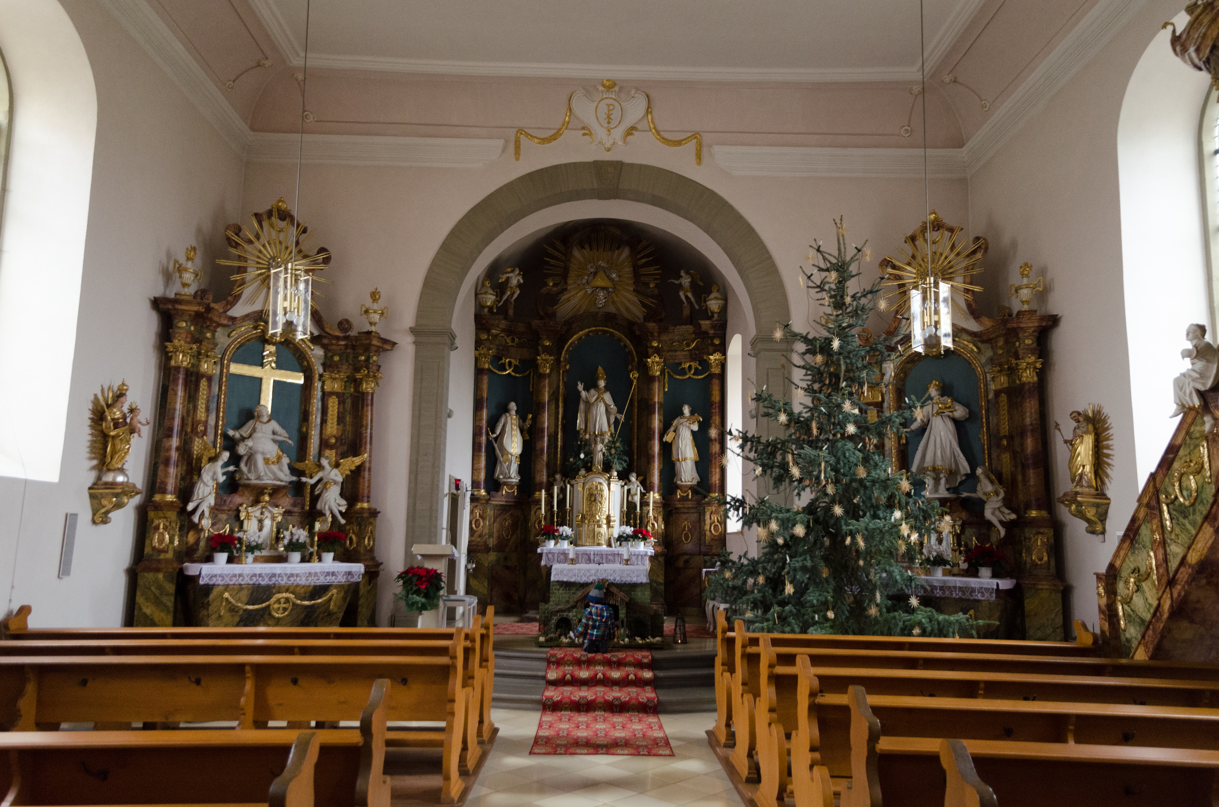 Kath. Kirche St. Kilian und St. Vitus in Wülfershausen